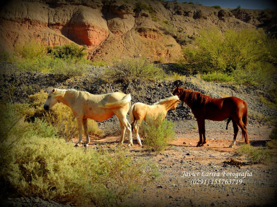 dfadsfas